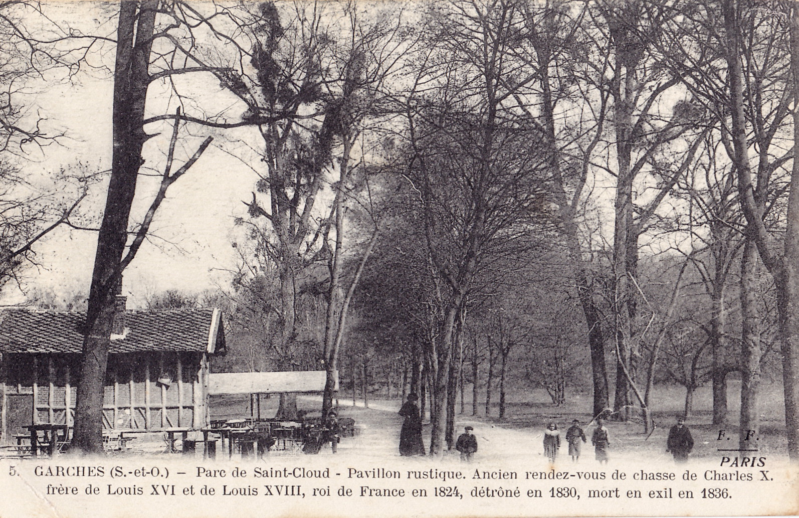 Carte postale ancienne éditée par FF à Paris, n°5 :GARCHES - PARC DE SAINT-CLOUD - Pavillon rustique. Ancien rendez-vous de chasse de Charles X, frère de Louis XVI et de Louis XVIII, roi de France en 1824, détrôné en 1830, mort en exil en 1836.